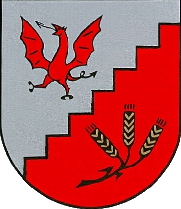 Rivenich Wappen